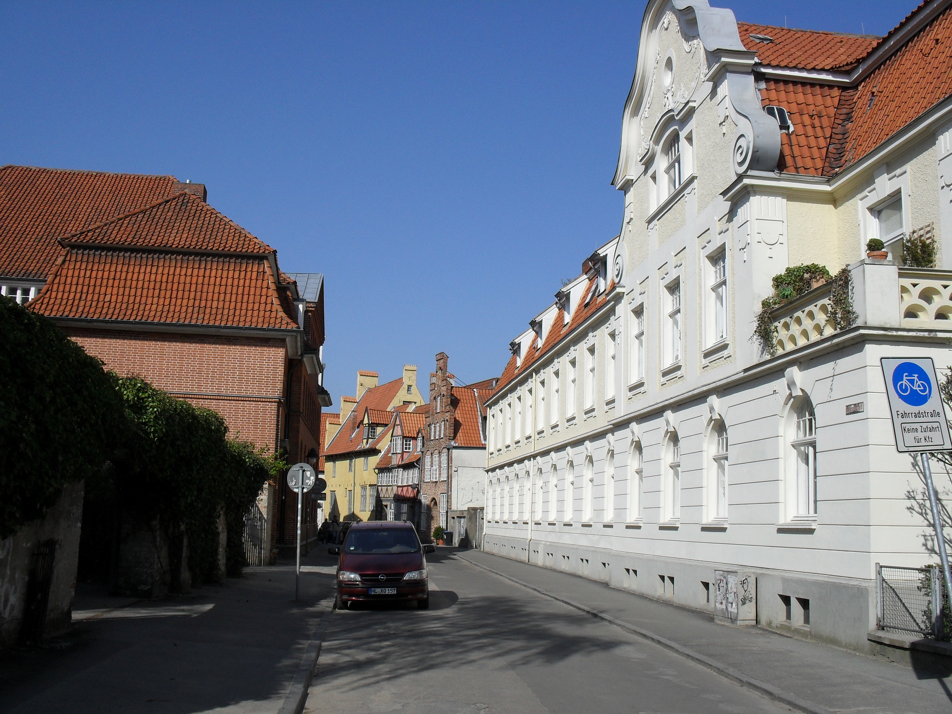 Der Rosengarten in Lübeck